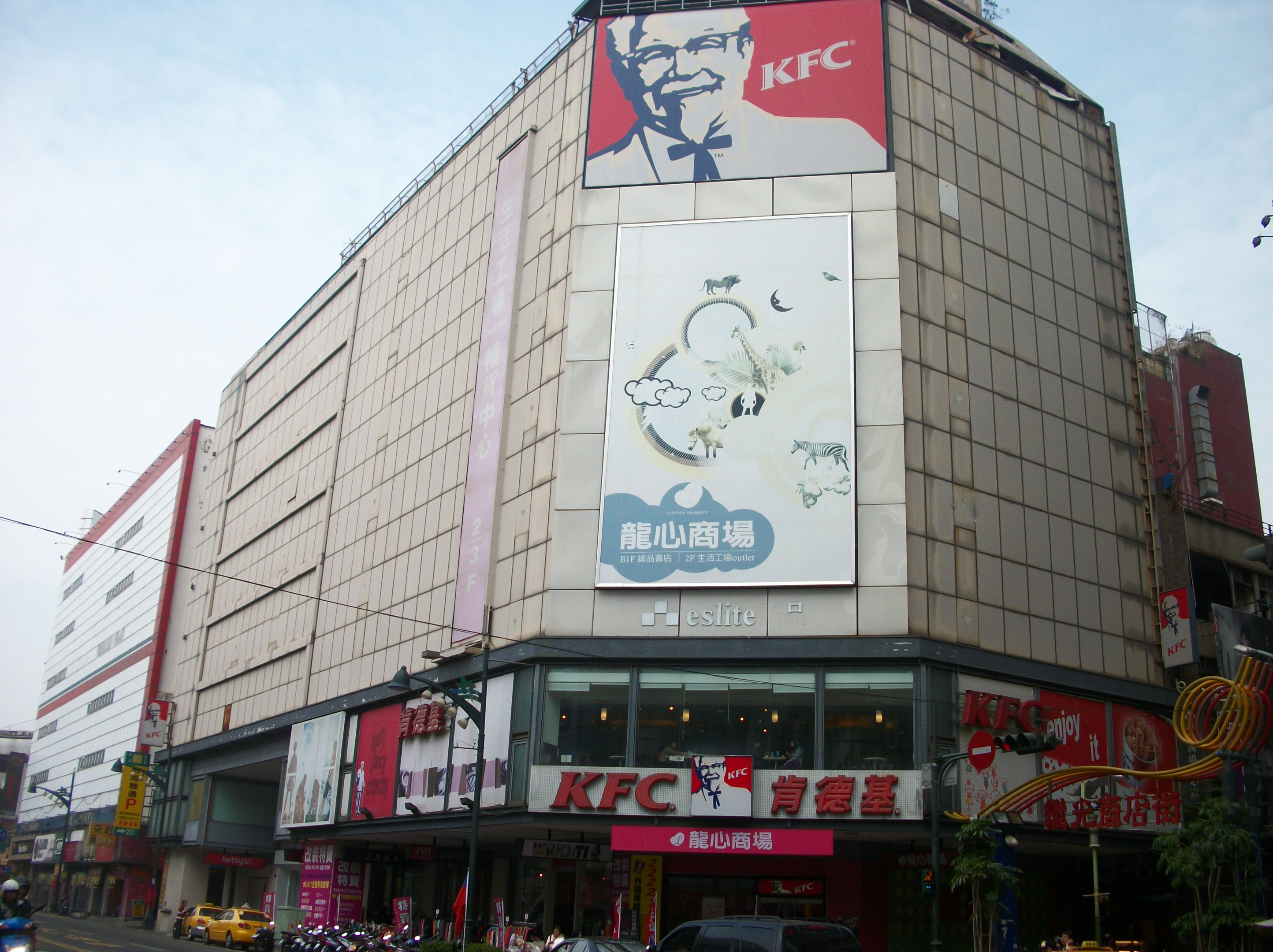 誠品龍心商場（原龍心百貨大樓）位於臺中市中區中正路80號。